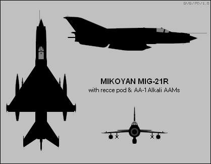 MiG-21R Izviđačka inačica